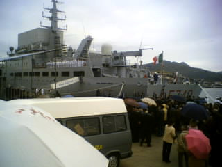 Cerimonia consegna bandiera di combattimento a Nave Elettra a Gaeta